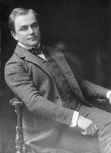 Der deutsche Schauspieler Gustl Waldau (1871-1958)